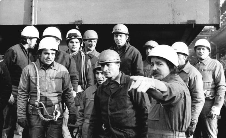 Polnische Gastarbeiter Für Bezieher des ADN-Reporterdienstes! Zum Beitrag: Montage zwischen Früh-und Abendzug- Eisenbahnstrecke mit neuer Technologie rasch überbrückt ADN-ZB Lehmann 18.2.1980-ha. Der Ruf "Uwaga!" des polnischen Brigadiers Eugeniusz Gardzinski stopt den schweren Eisenbahndrehkran, der gerade eine Rohrbrücke über eine internationale Eisenbahnstrecke hebt. Die polnischen Spezialisten vom Projektierungs- und Montagebetrieb "Naftobudowa Krakow" haben seit acht Jahren Erfahrungen mit der Rohrbrückenmontage sammeln können. Eine solche Millimeterarbeit mit einer 80 Tonnen schweren Rohrbrücke hatten sie allerdings noch nicht. Mit atemloser Spannung verfolgen sie, ab und zu eine Wort wechselnd, ob das Einheben der Brücke nach einer neuen Technologie gelingt. Wenige Stunden später ist es geschafft. Der in zwei Teile gespaltene Betriebsteil Wolfen des CKB ist überbrückt! (Hierzu auch W 0218-302+303+305N)